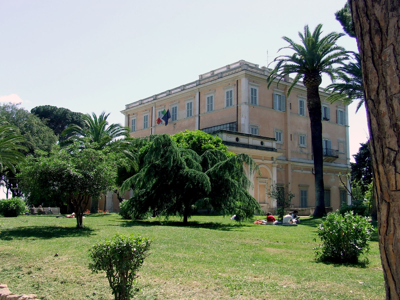 Società Geografica Italiana - palazzetto Mattei - Villa Celimontana, Roma